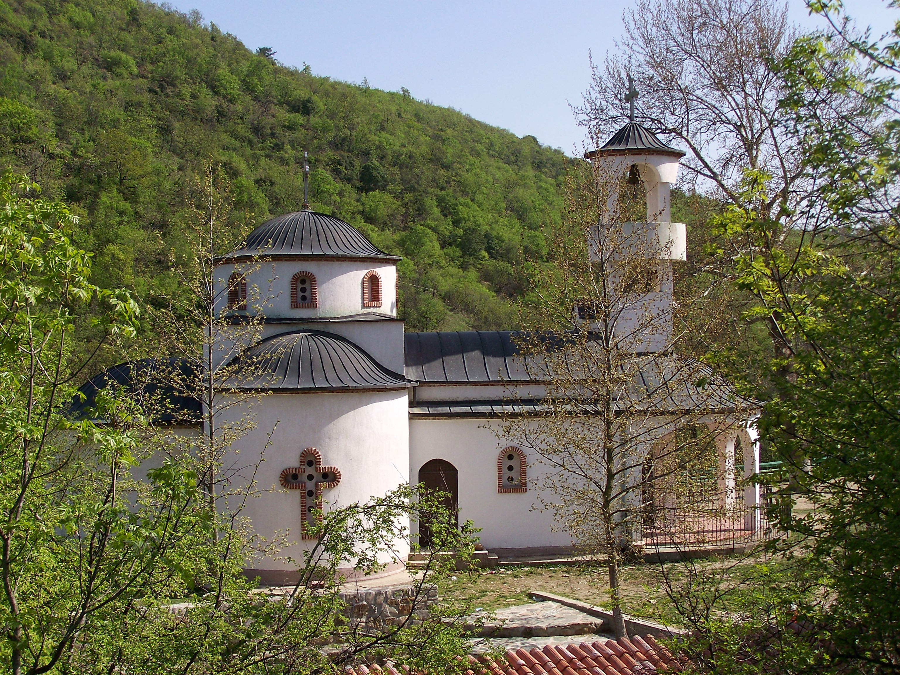 Strumica